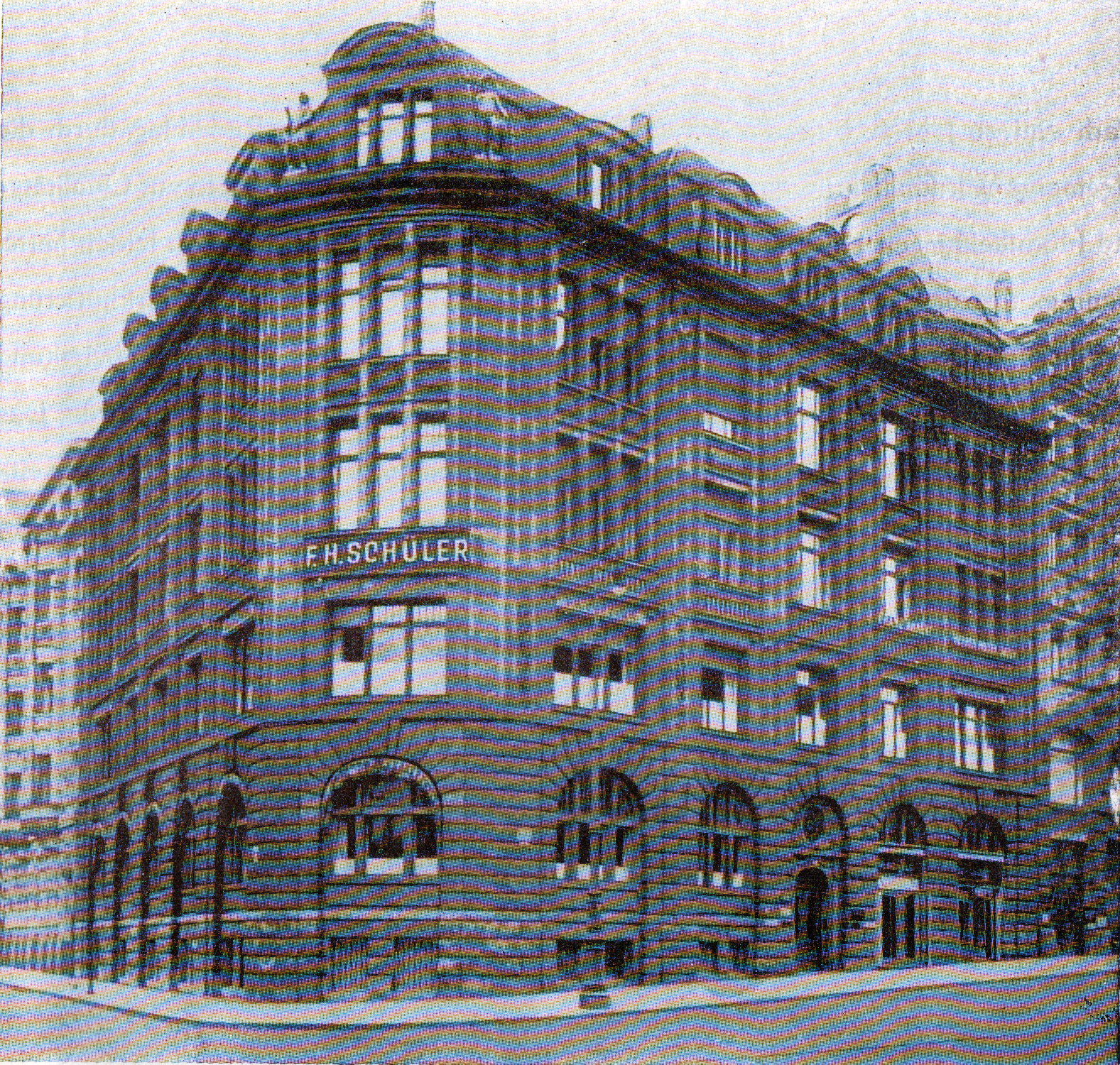 75 Jahre Schüler, Leipzig - aus der Jubiläumsbroschüre des Jahres 1937. Bildunterschrift: Geschäftshaus Thomaskirchhof 20 Broschürentext siehe in der → Kategoriebeschreibung